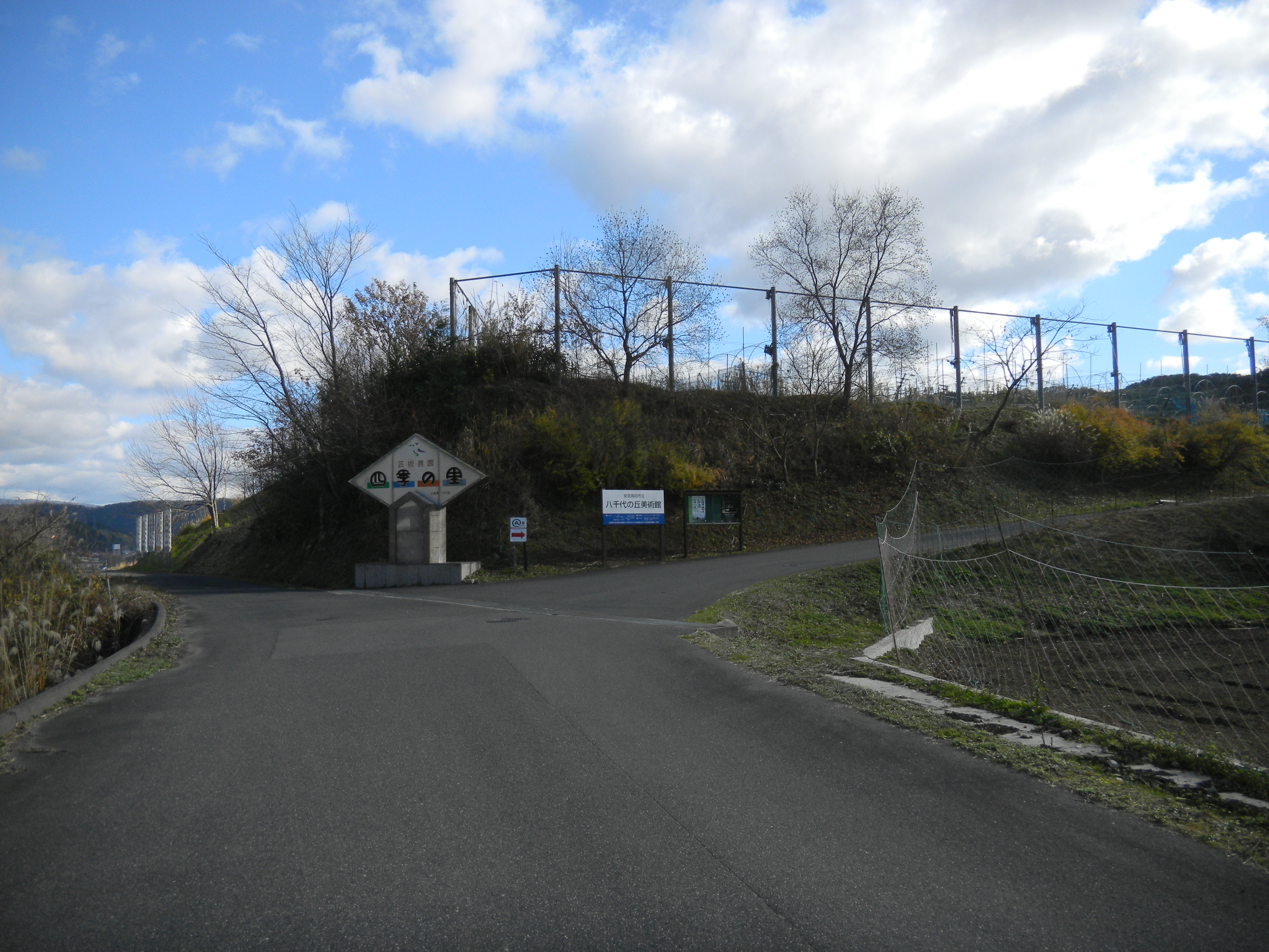 広島県 八千代町